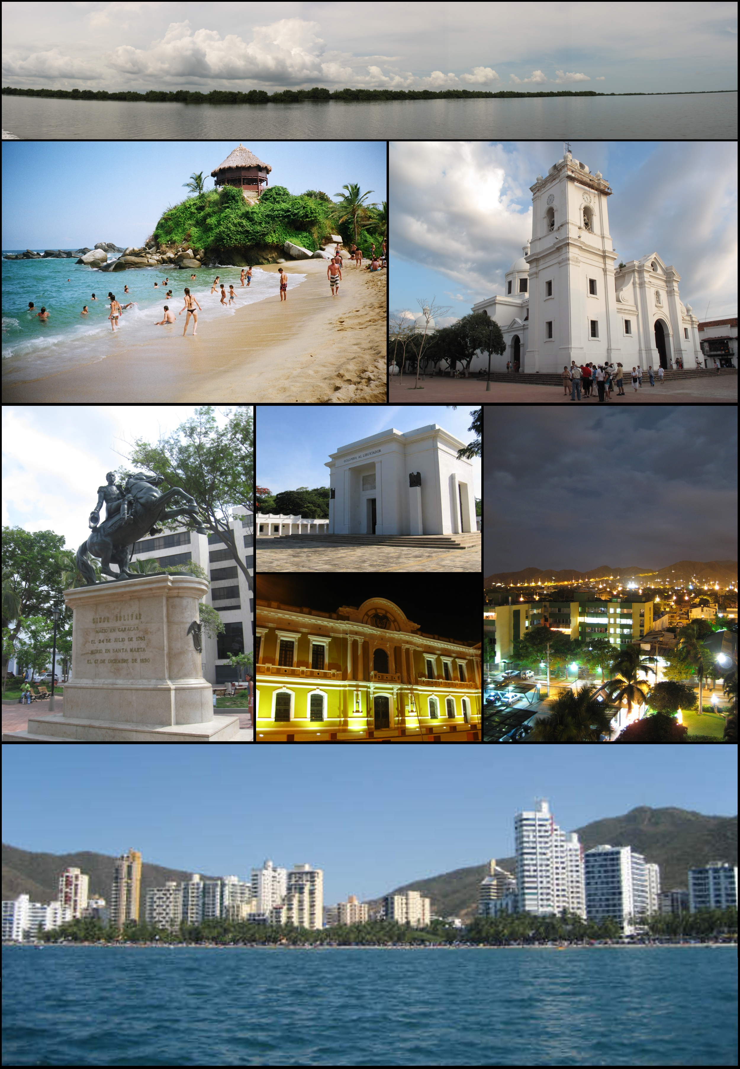 Santa Marta, Colombia